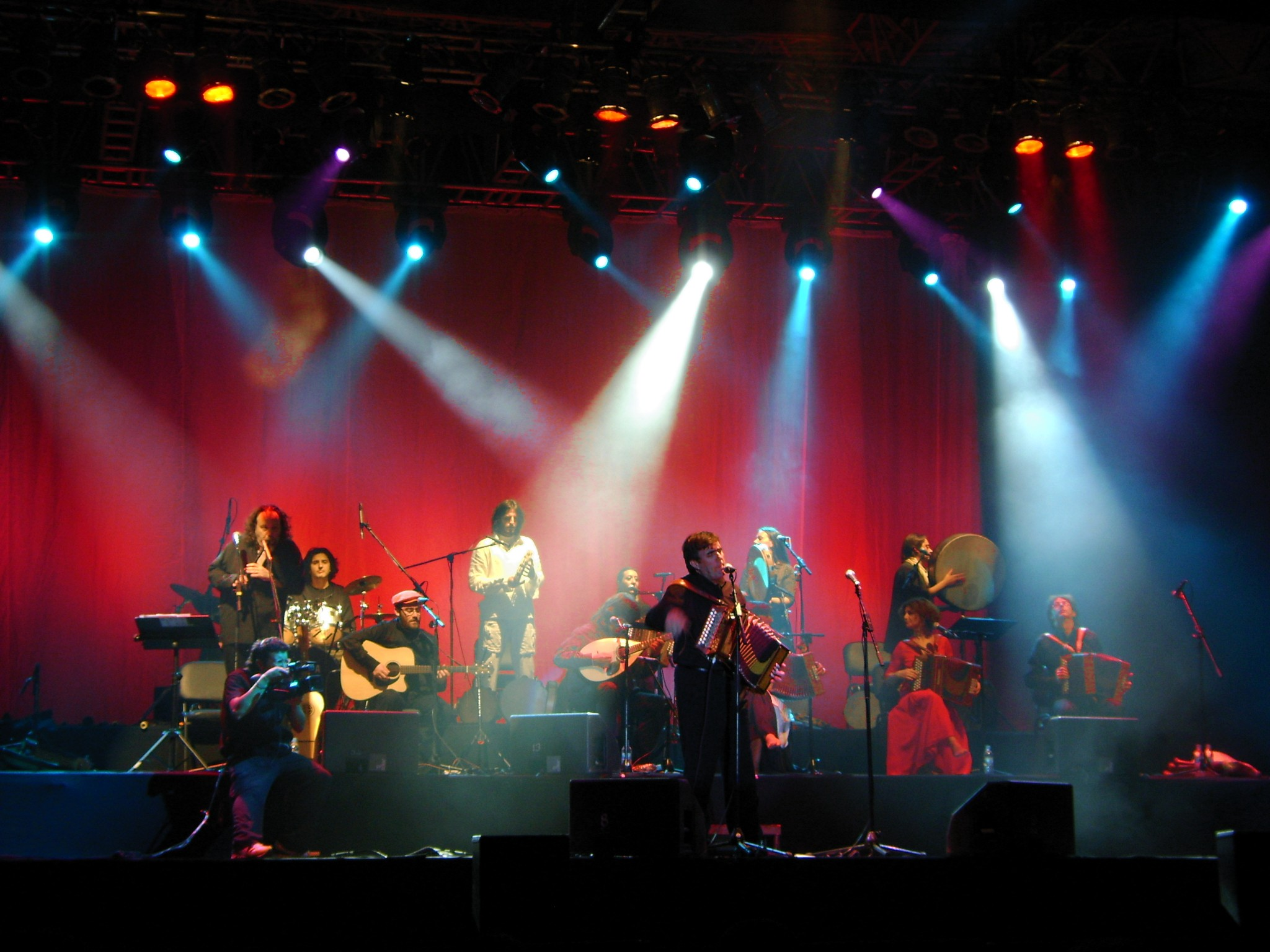 Orchesta Popolare Italiana en la FIL 2008